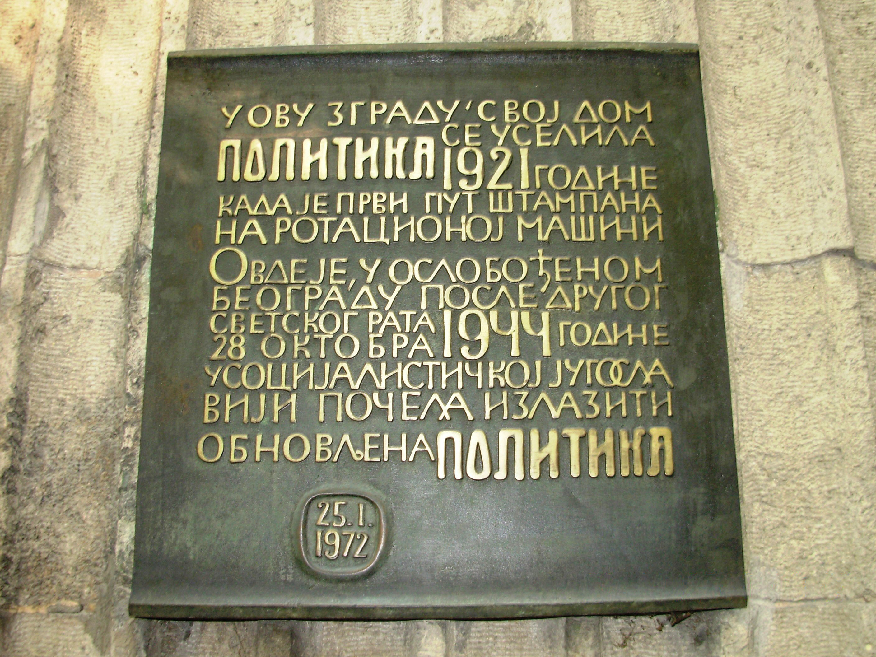 Табла на згради, поред сада познате, зграде "Политике". Сликао Голдфингер.